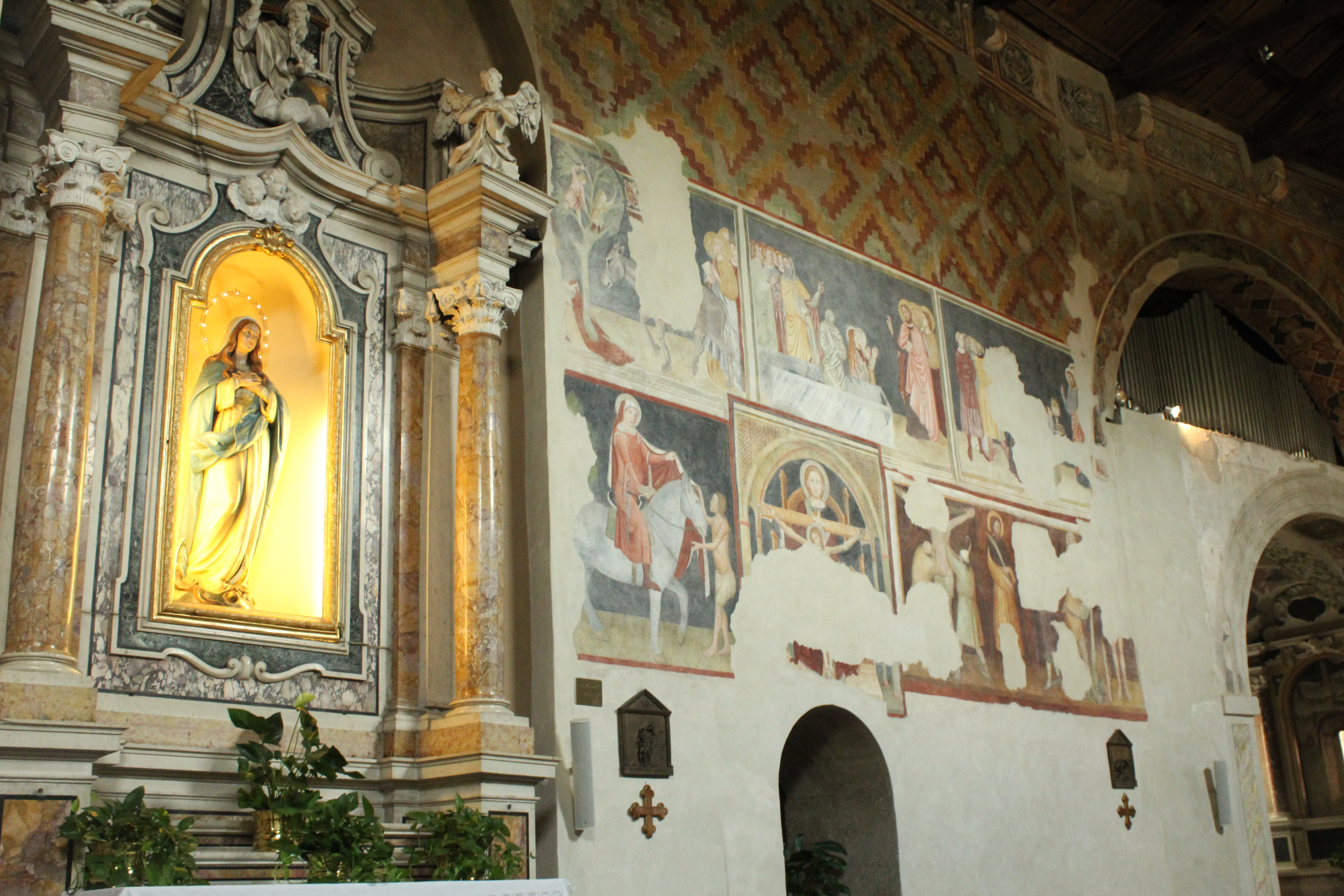 Chiesa della Santissima Trinità in Monte Oliveto a Verona, lato sinistro. altare della Madonna Immacolata e ciclo di affreschi: Fascia superiore: Ingresso di Gesù a Gerusalemme, la risurrezione di Lazzaro, la moltiplicazione dei pani e dei pesci, Fascia inferiore: San Martino e il povero, la SS. Trinità, Santa Agata torturata, San Pietro Martire, San Sebastiano